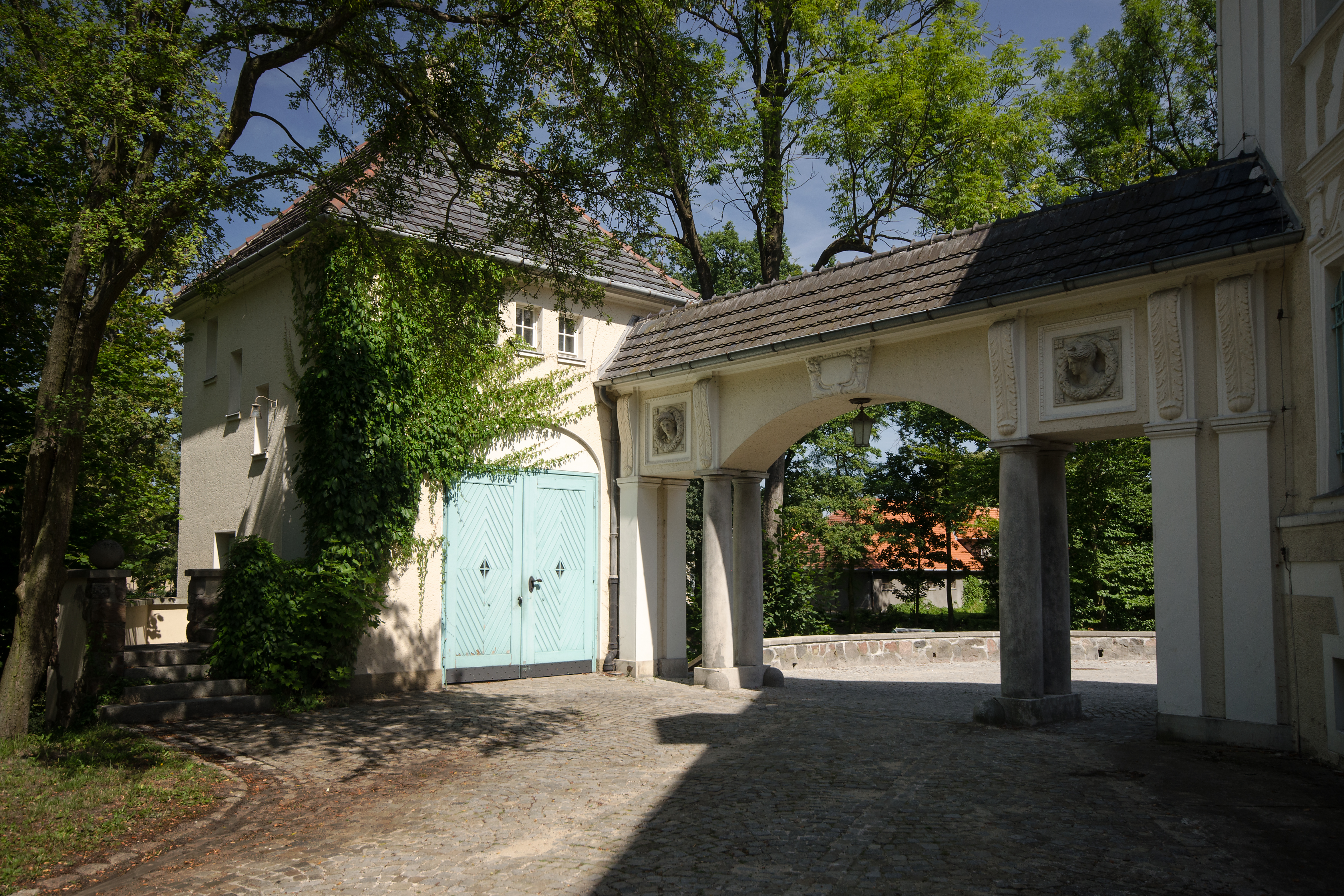 Bagno, garaż z bramą, 1913